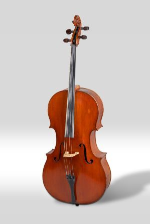 Violoncel conservat al Museu de la Música de Barcelona, obra de Joan Guillamí. Número de registre: MDMB 10488 Rafael Vargas